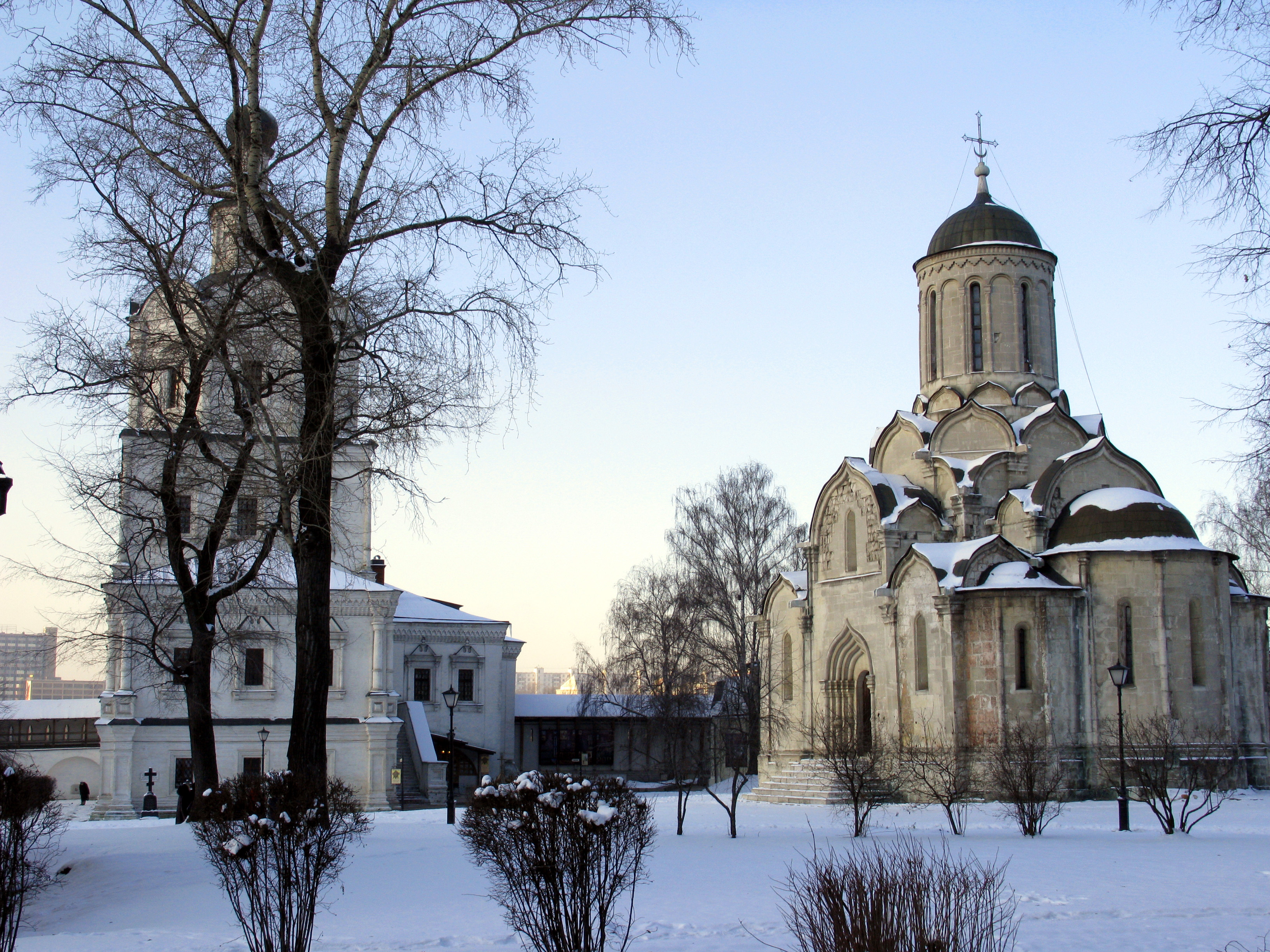 Андроников монастырь